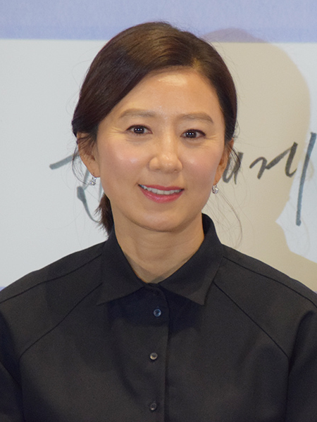 영화 '윤희에게' 시사회 현장 (2019.11.5 서울 롯데시네마건대입구)